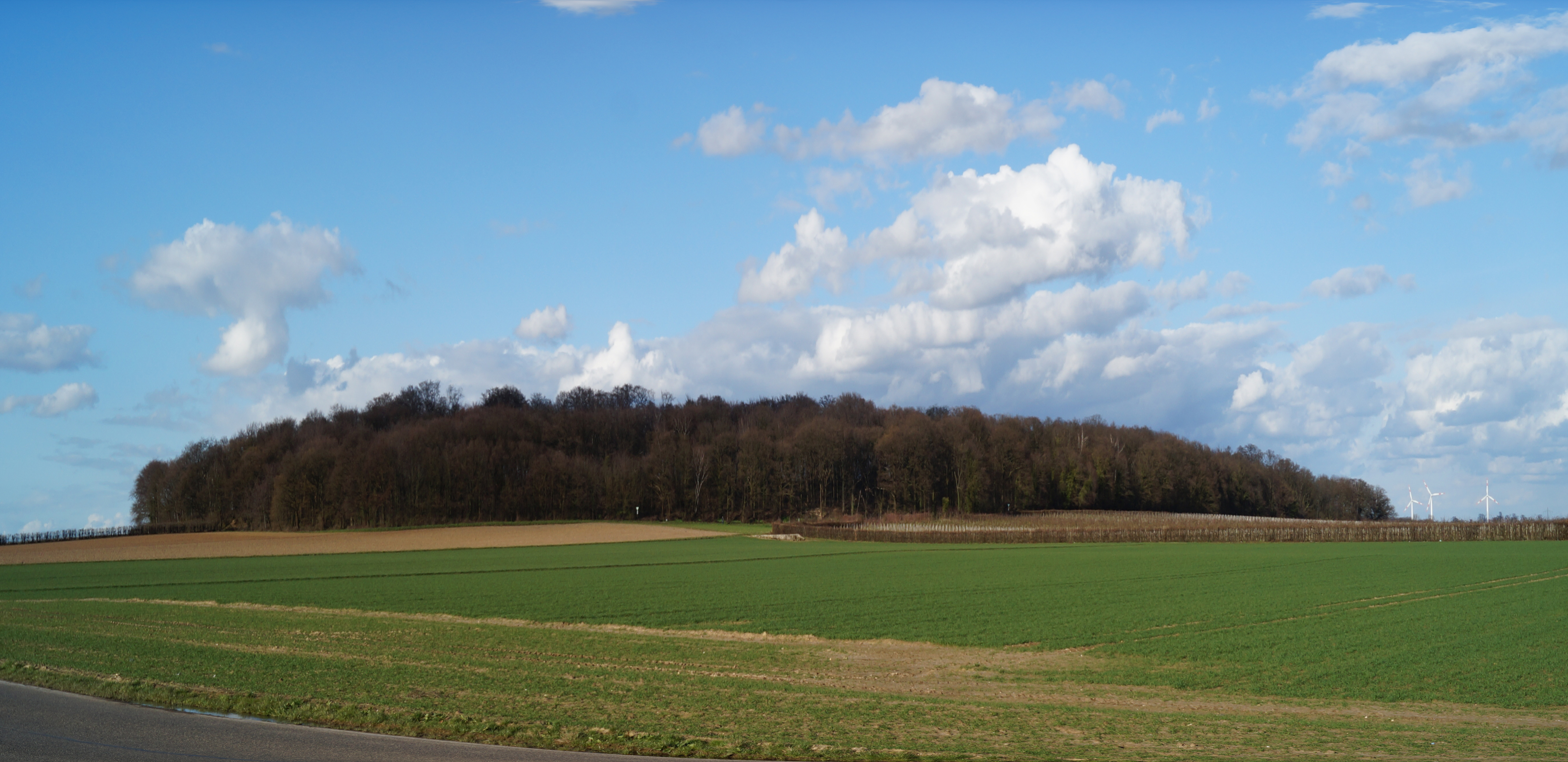 Der Liedberg von Südwesten; Wald im Naturschutzgebiet „Quarzitkuppe Liedberg“, Korschenbroich